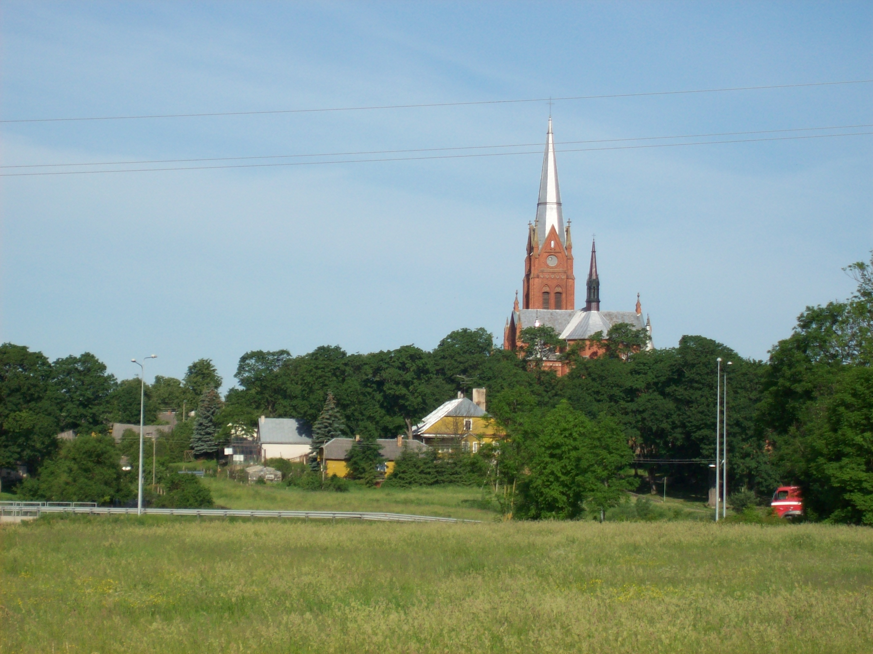 Ramygalos Šv. Jono Krikštytojo bažnyčia